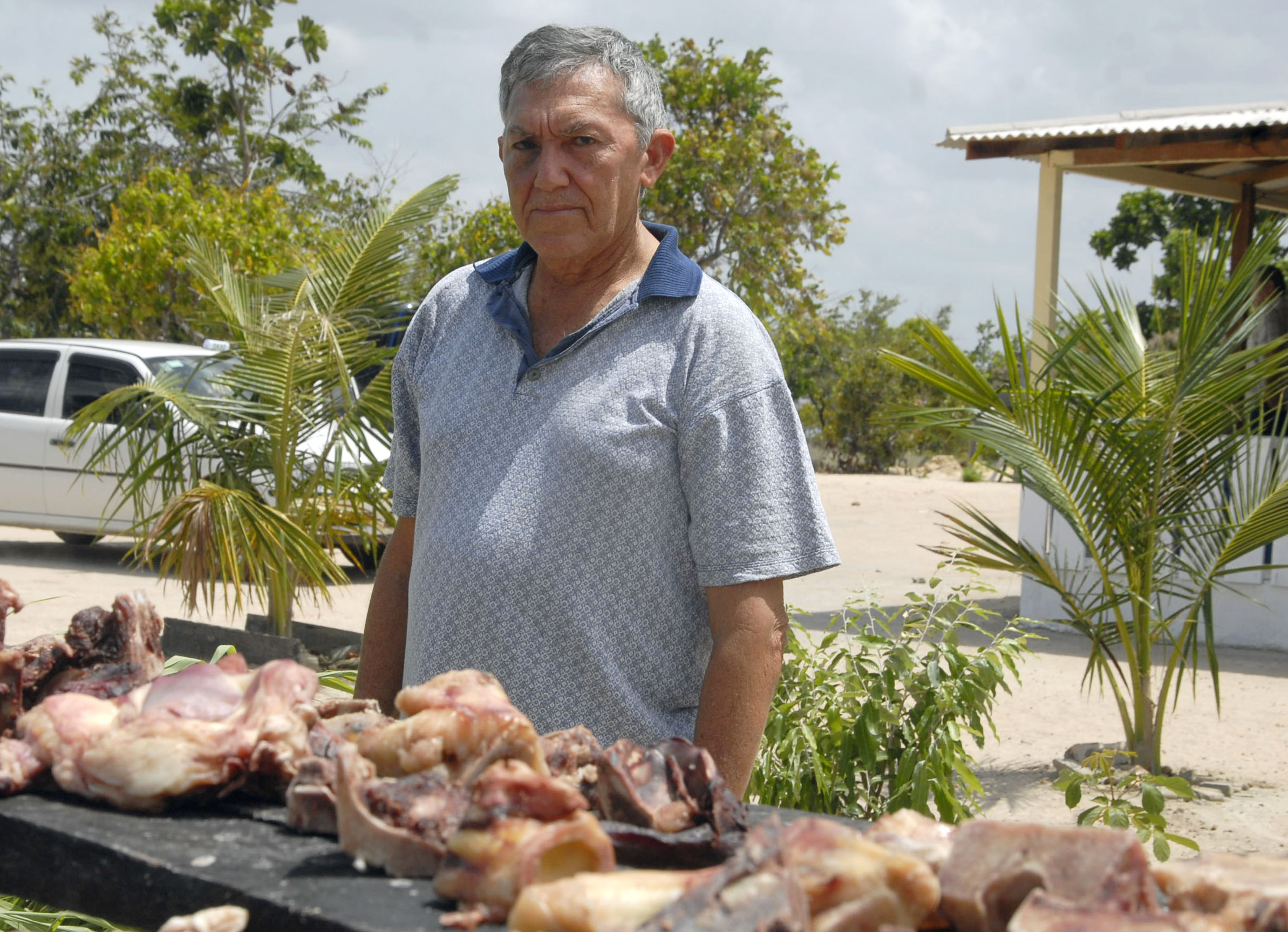 Carne de sol, preparada pelo fazendeiro Adílio Araújo.